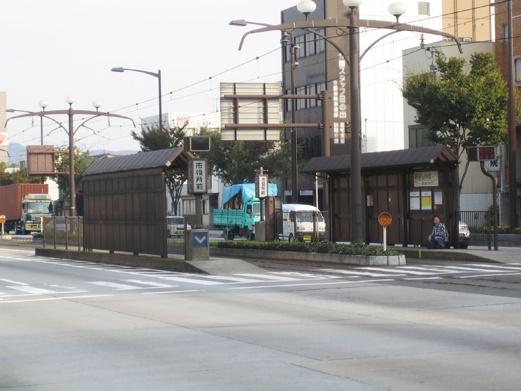 Shiyakusho-mae Station (市役所前駅), Toyohashi, Aichi, Japan